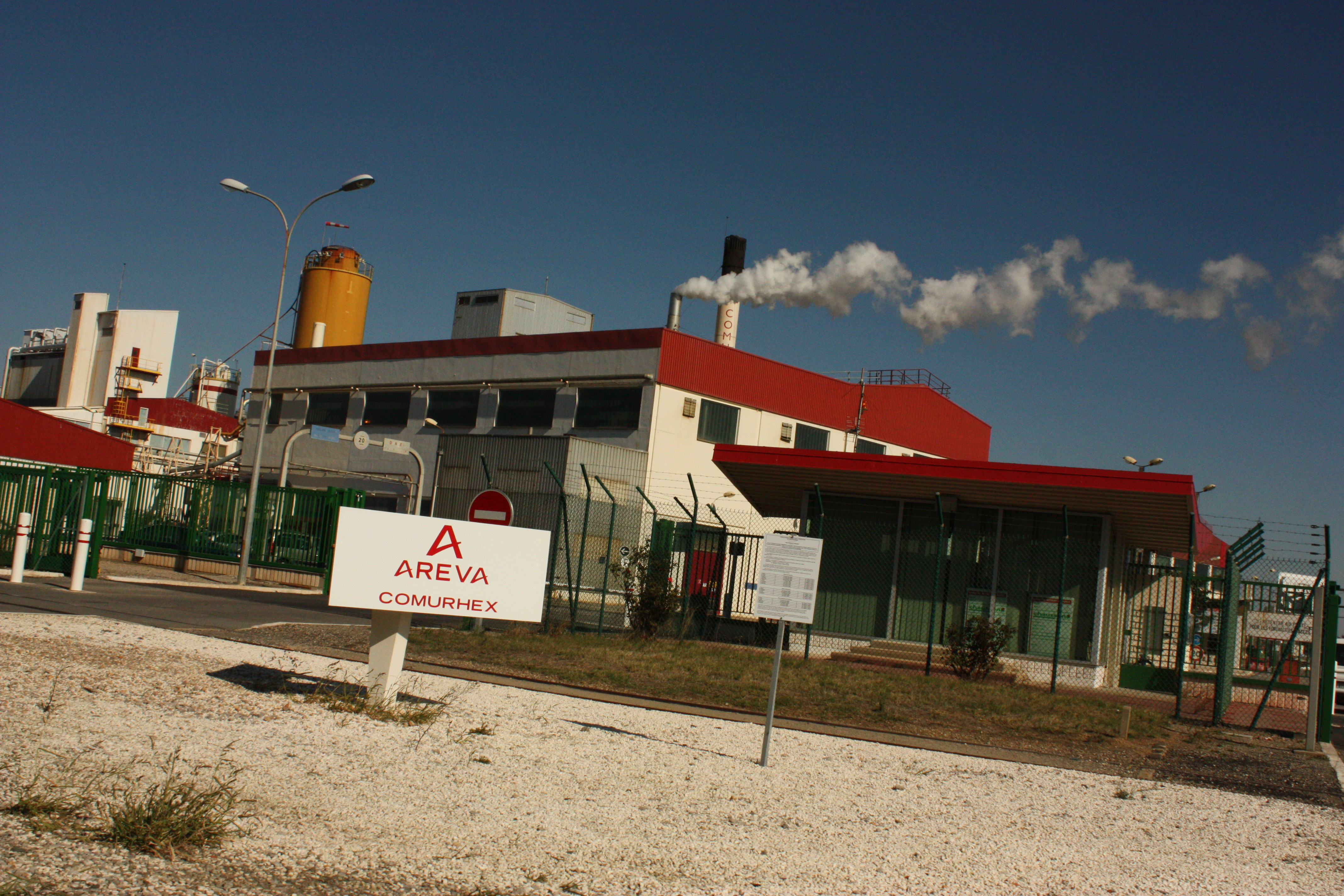 Photo prise depuis l'entrée de l'usine de Malvési